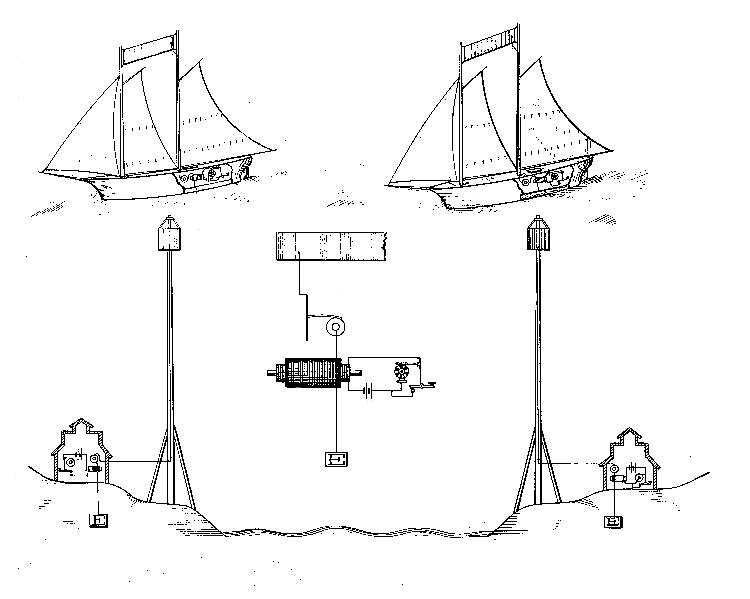 U.S. Patent 465,971